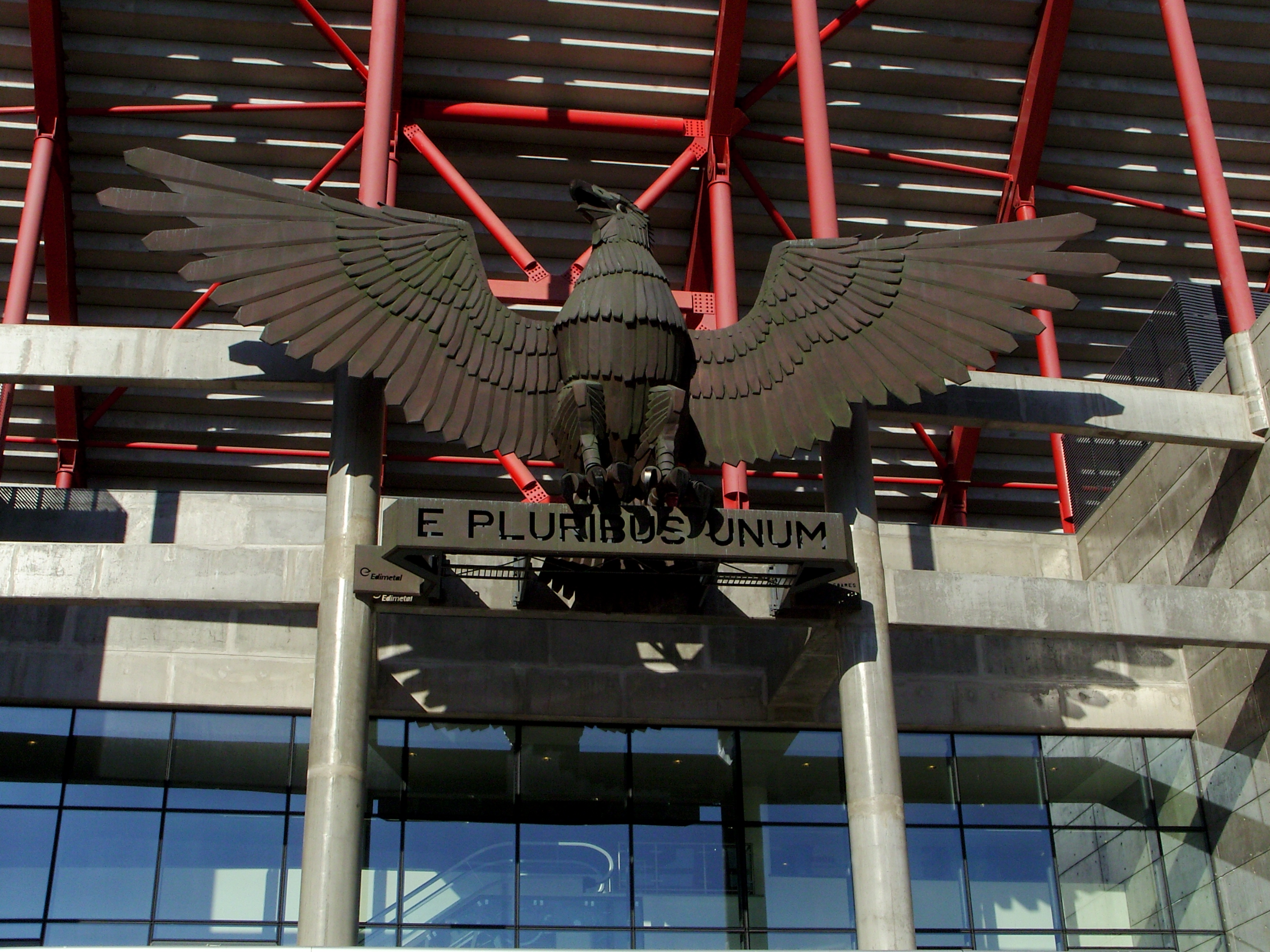 Lisbon 2008